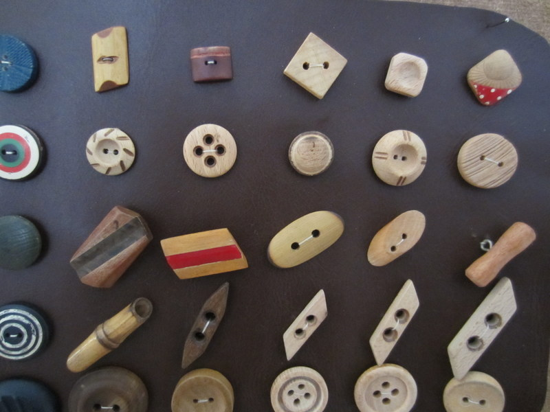 Knoflíky vyráběné ze dřeva